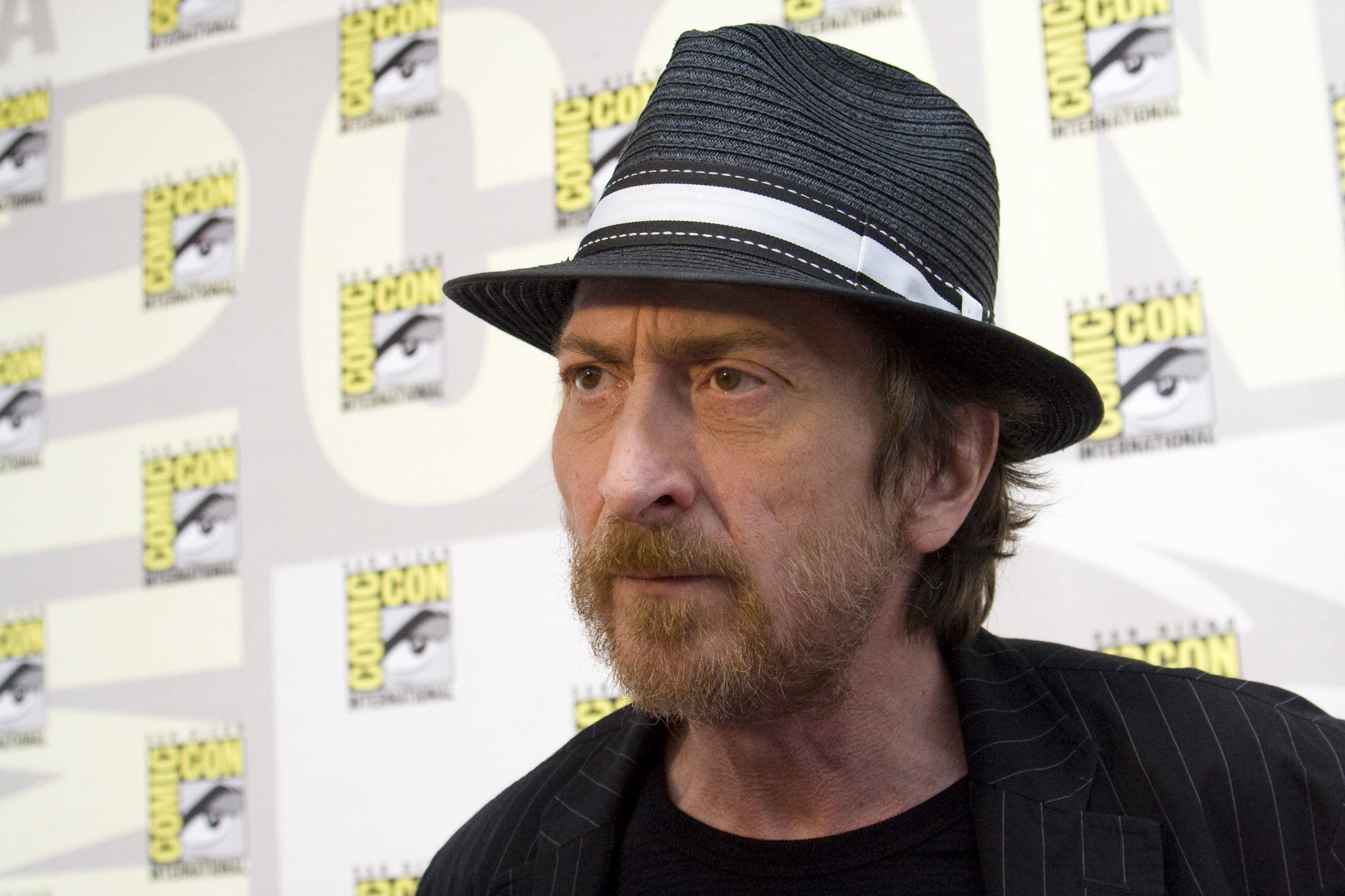 Frank Miller at depicted person: Frank Miller (age: 51.49)